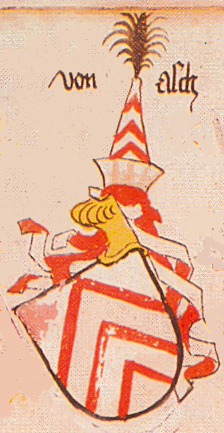 Ingeram-Codex der ehemaligen Bibliothek Cotta von asch freigestellt aus